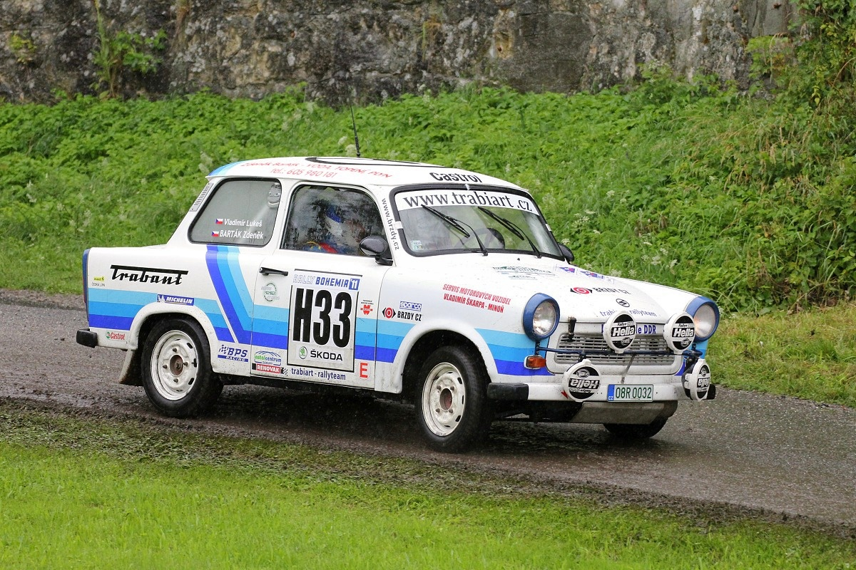 Rally Bohemia 2011